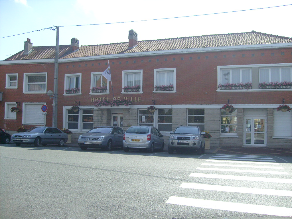 Mairie de Tétèghem